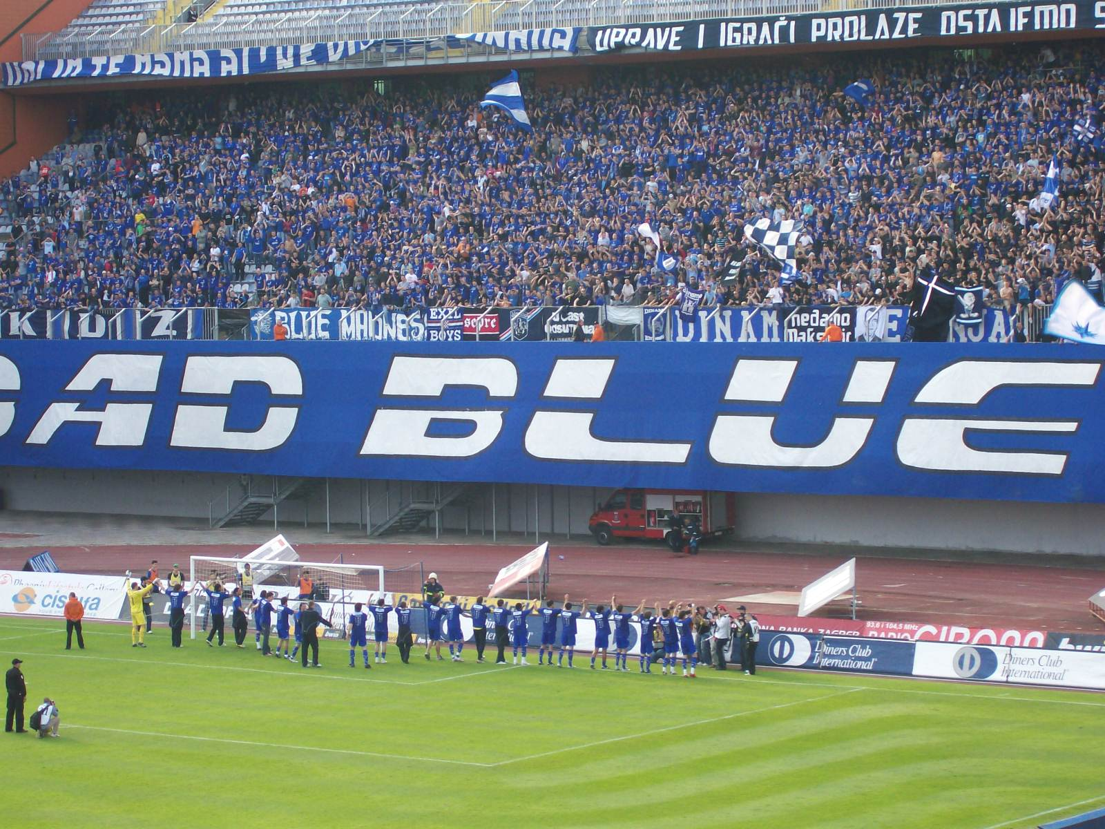 Igrači Dinama ispred Sjevera na stadionu Maksimir